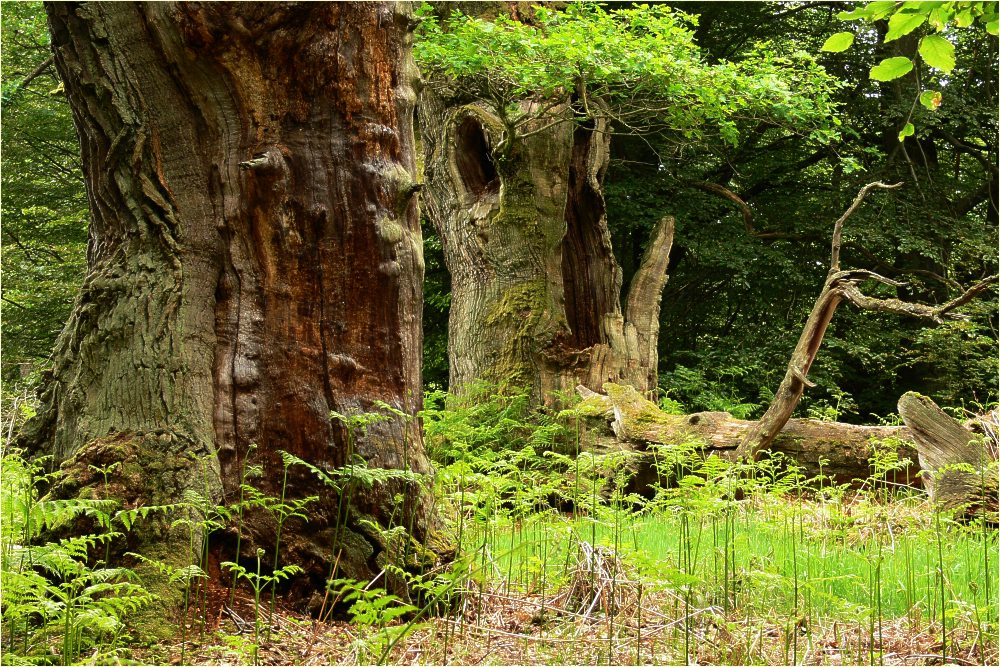 alte Eichen (Quercus robur) des Urwalds Sababurg im Mai 2007